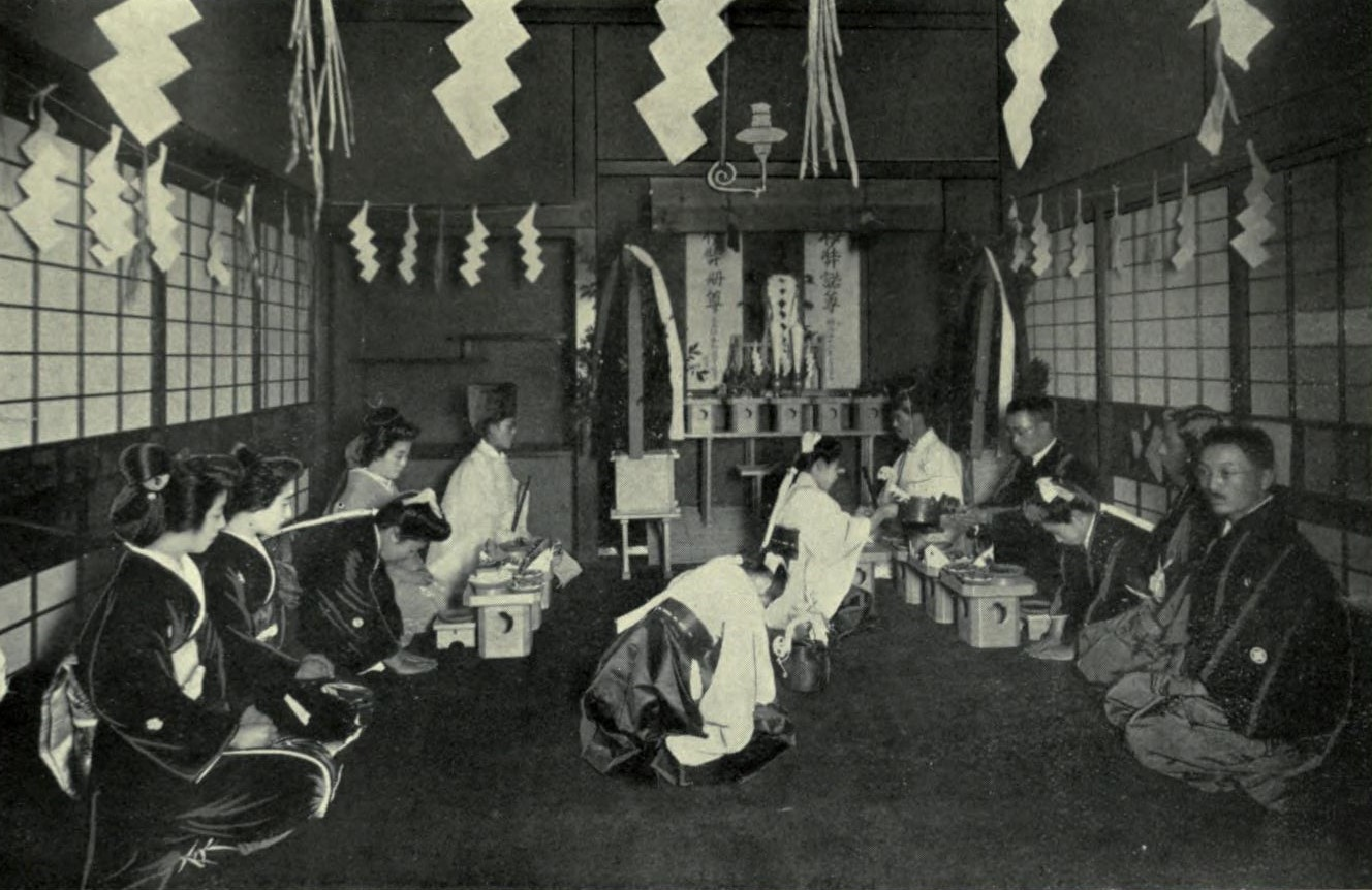 日本の結婚式 20世紀初期